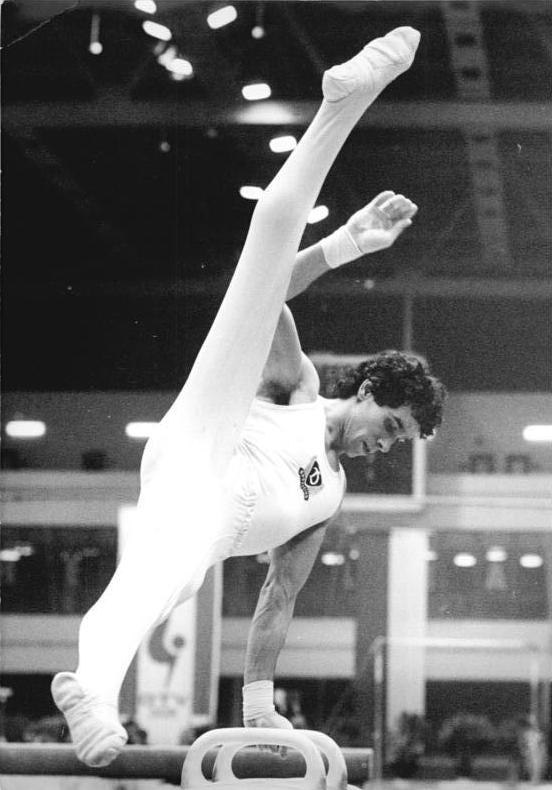 Michael Nikolay ADN-ZB Kluge 19.12.82 Leipzig: DDR-Meisterschaften im Geräteturnen -Michael Nikolay (SC Dynamo Berlin) wurde Sieger am Seitpferd mit 19,650 Punkten.